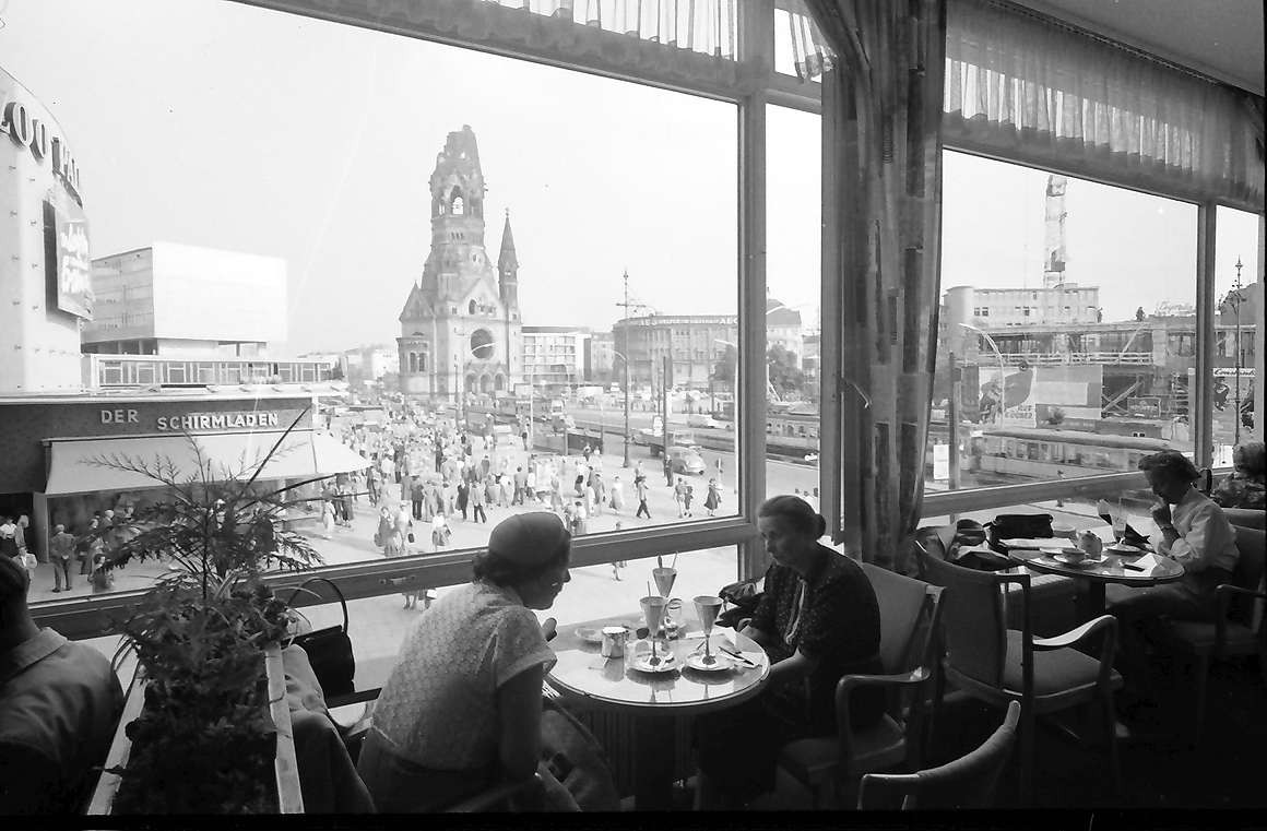 Blick aus dem Café Huthmacher im DOB-Hochhaus auf die Kaiser-Wilhelm-Gedächtniskirche in Berlin-Charlottenburg.